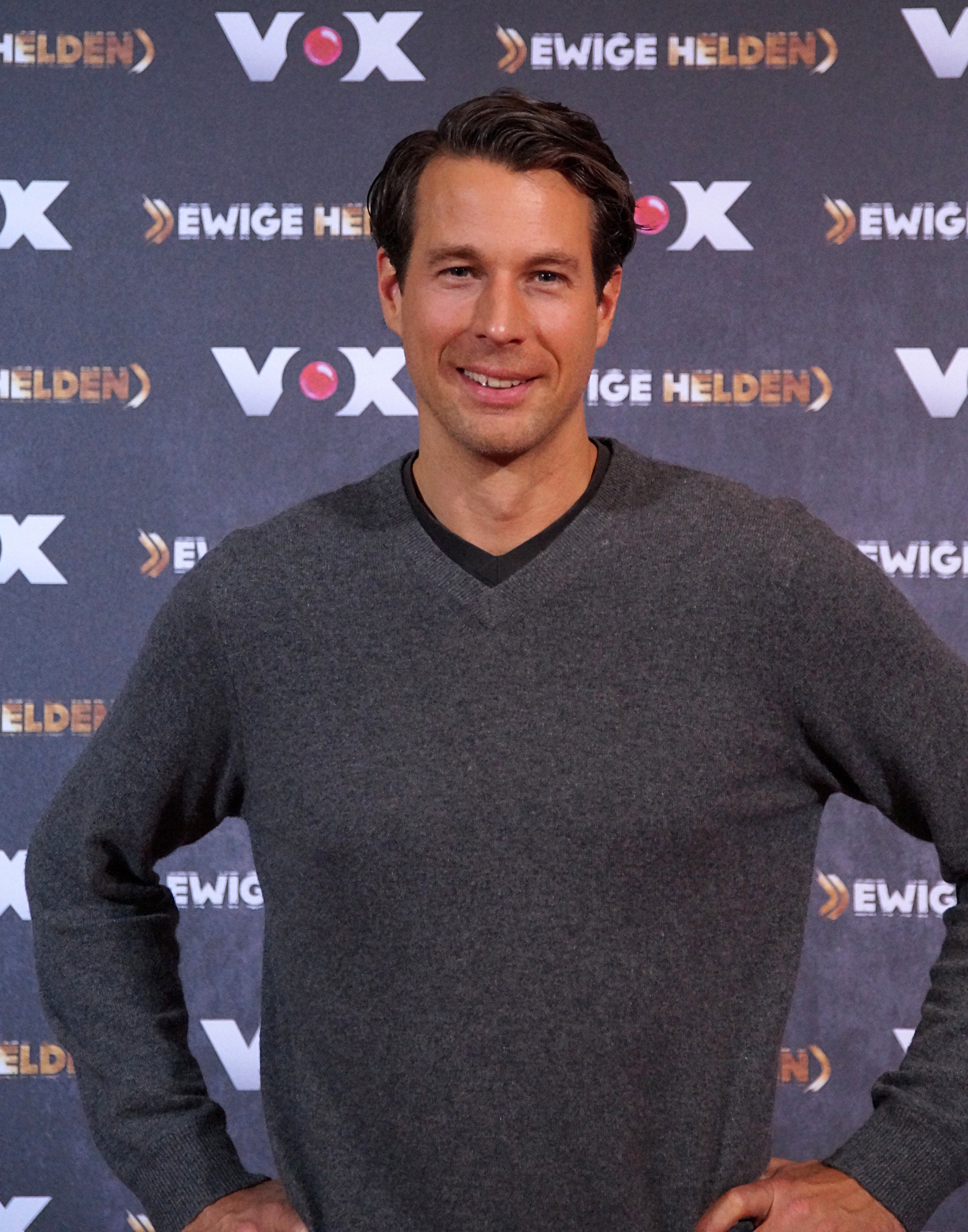 Danny Ecker beim VOX "Ewige Helden" Pressetermin, im Dezember 2015.